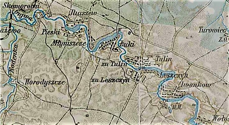 Leszczyn na mapie wojskowej Austro-Węgier (1 200 000), 1910 r.